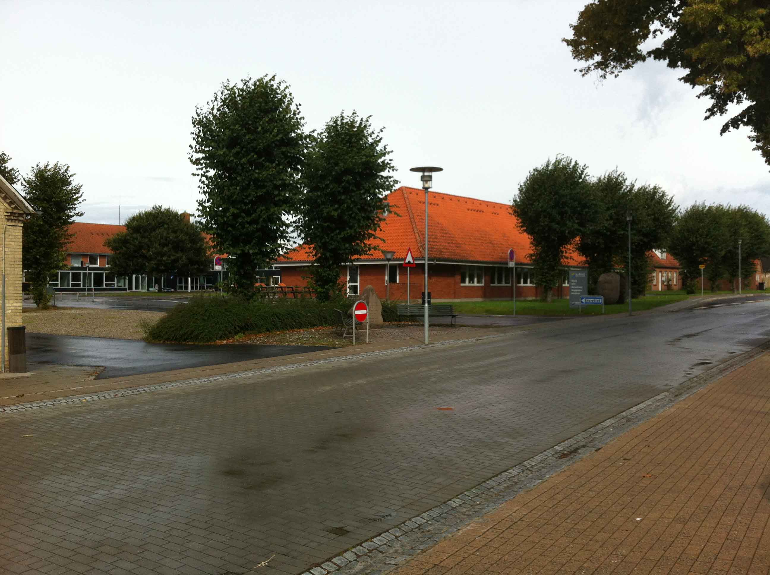 Båring Skole